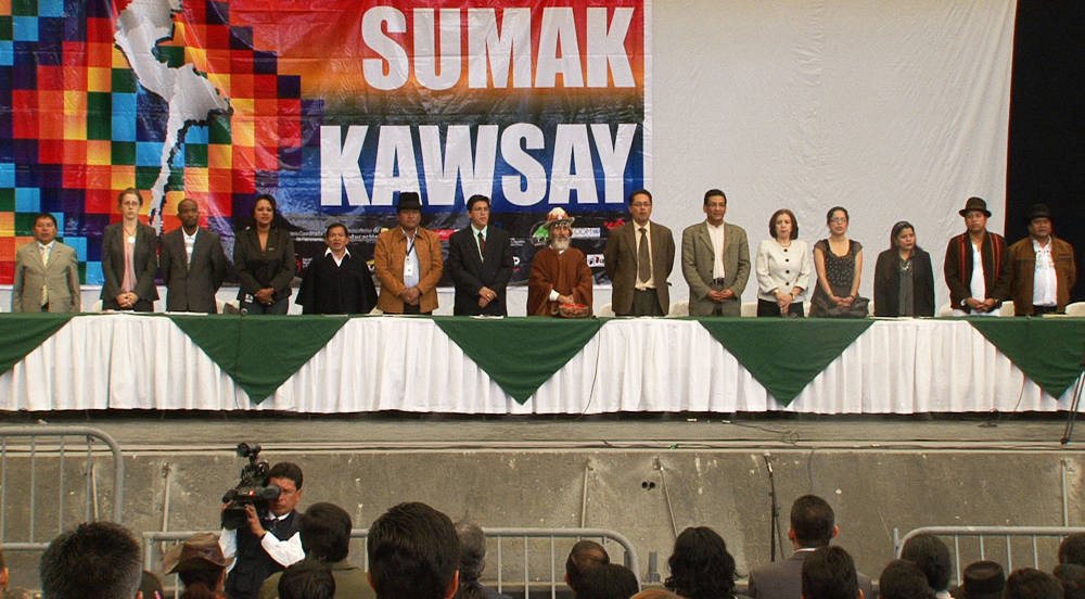 Este mensaje ha sido examinado por Symantec del MRECI y se considera libre de virus y spam.